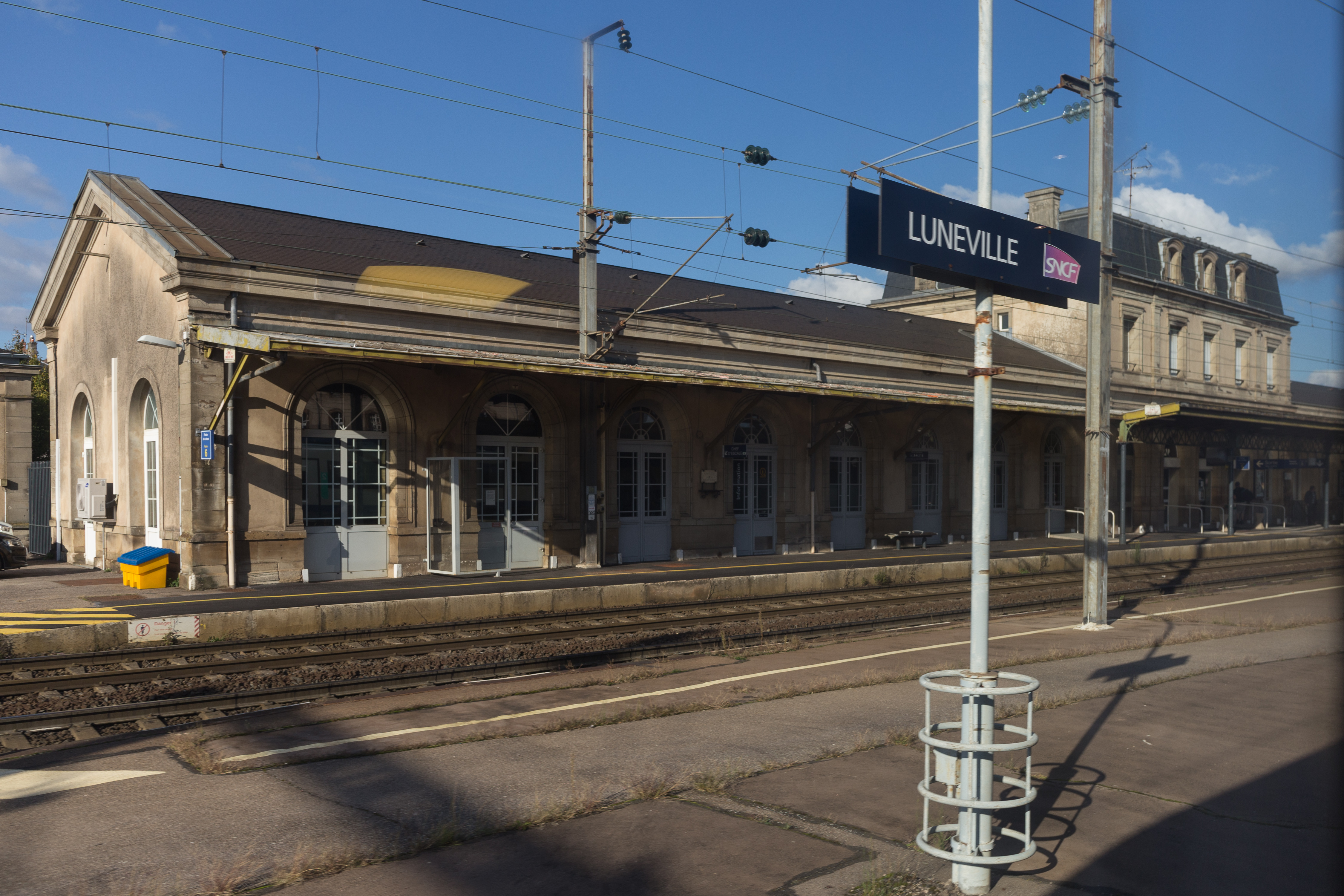 La gare de Lunéville vue de la voie C.